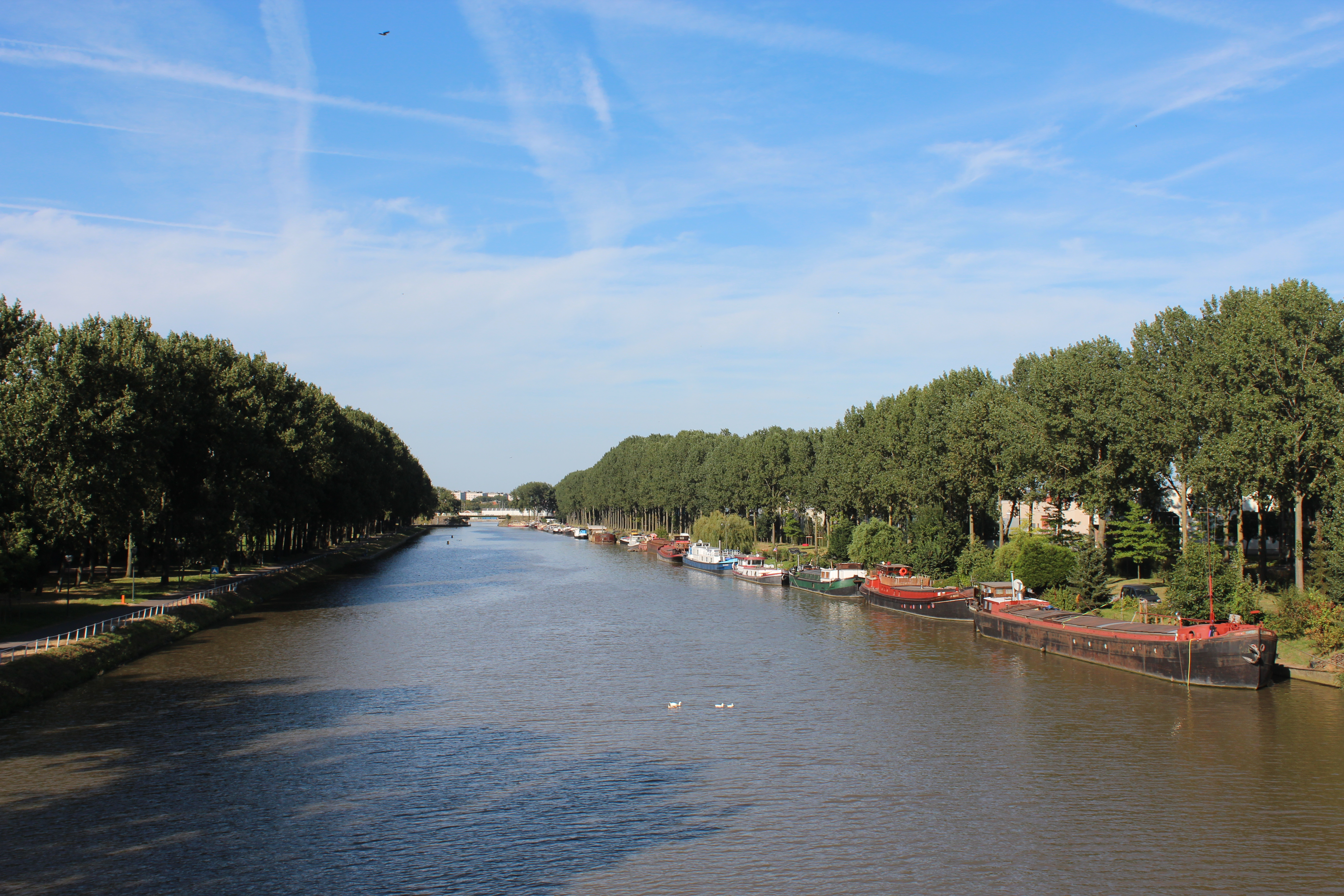 Canal Bruxelles-Charleroi, à Anderlecht (Région Bruxelles Capitale), vu vers le Nord-est du Pont Paepsem.